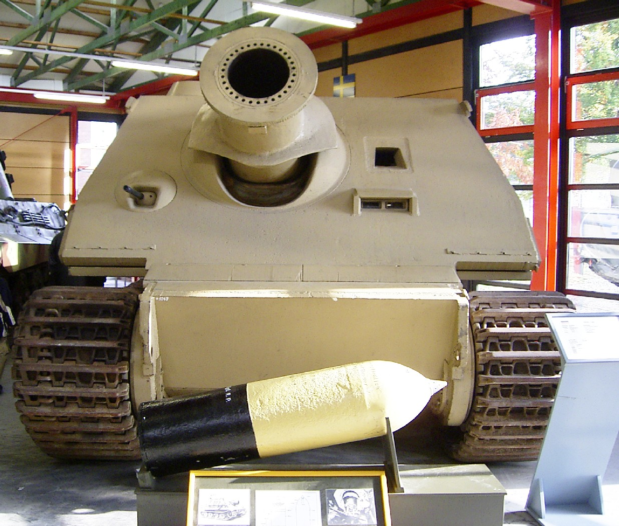 Sturmtiger im Deutschen Panzermuseum Munster. Davor eines der Raketengeschosse.